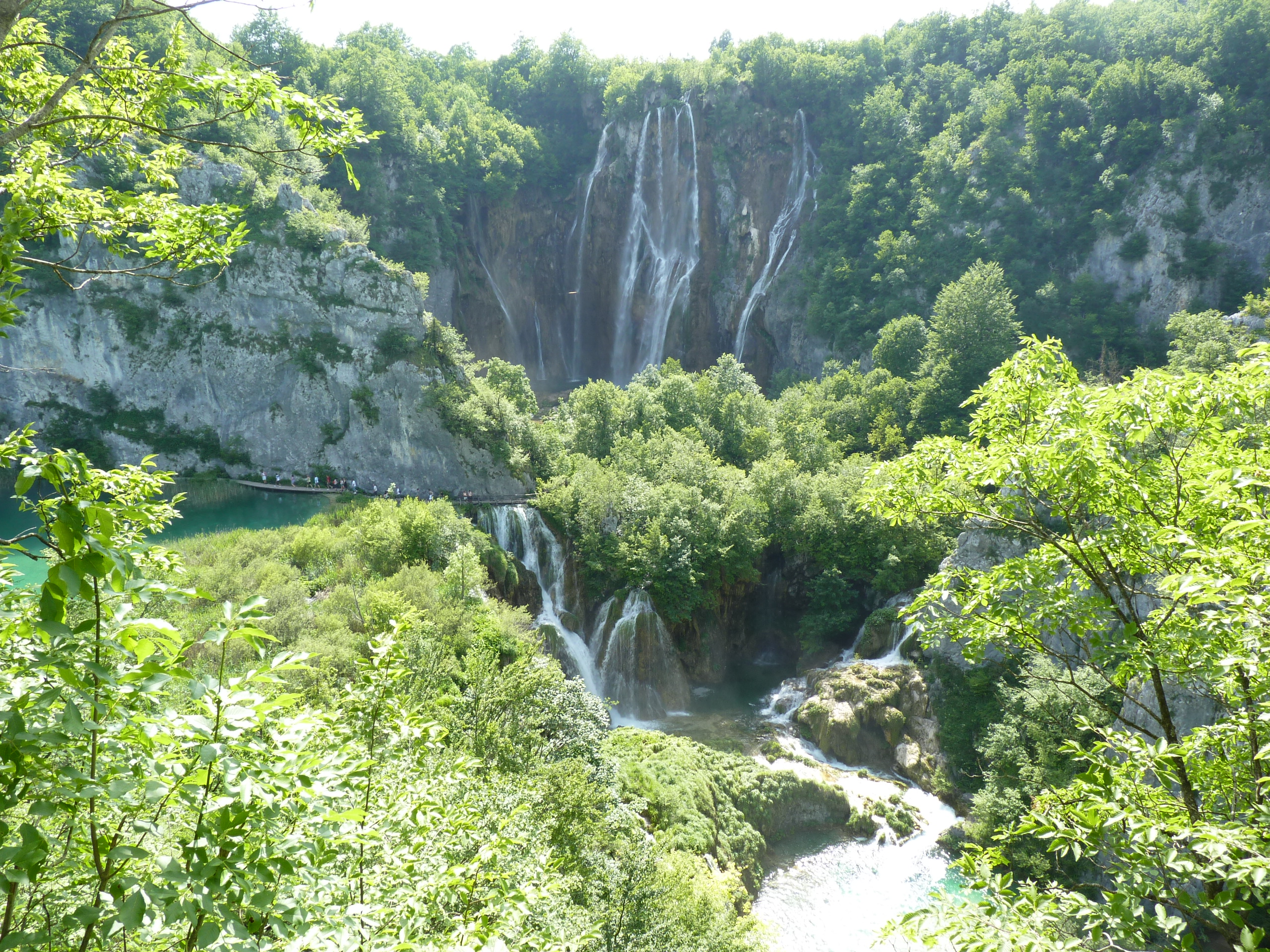 플리트비체 국립공원의 한 모습니다. 크고 작은 폭포가 어우러져 장관을 이룬다.